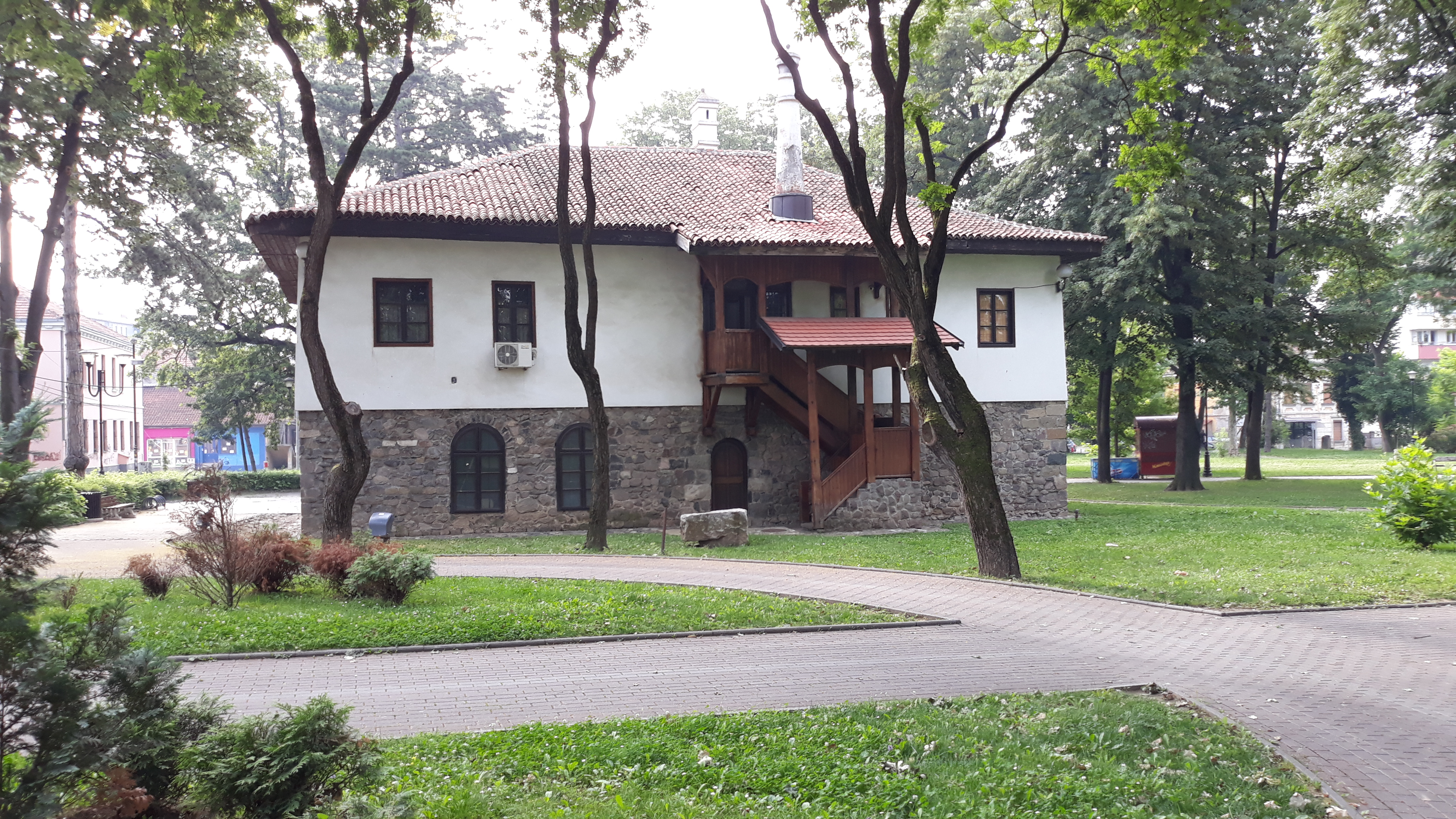 Парк Светог Саве у Краљеву